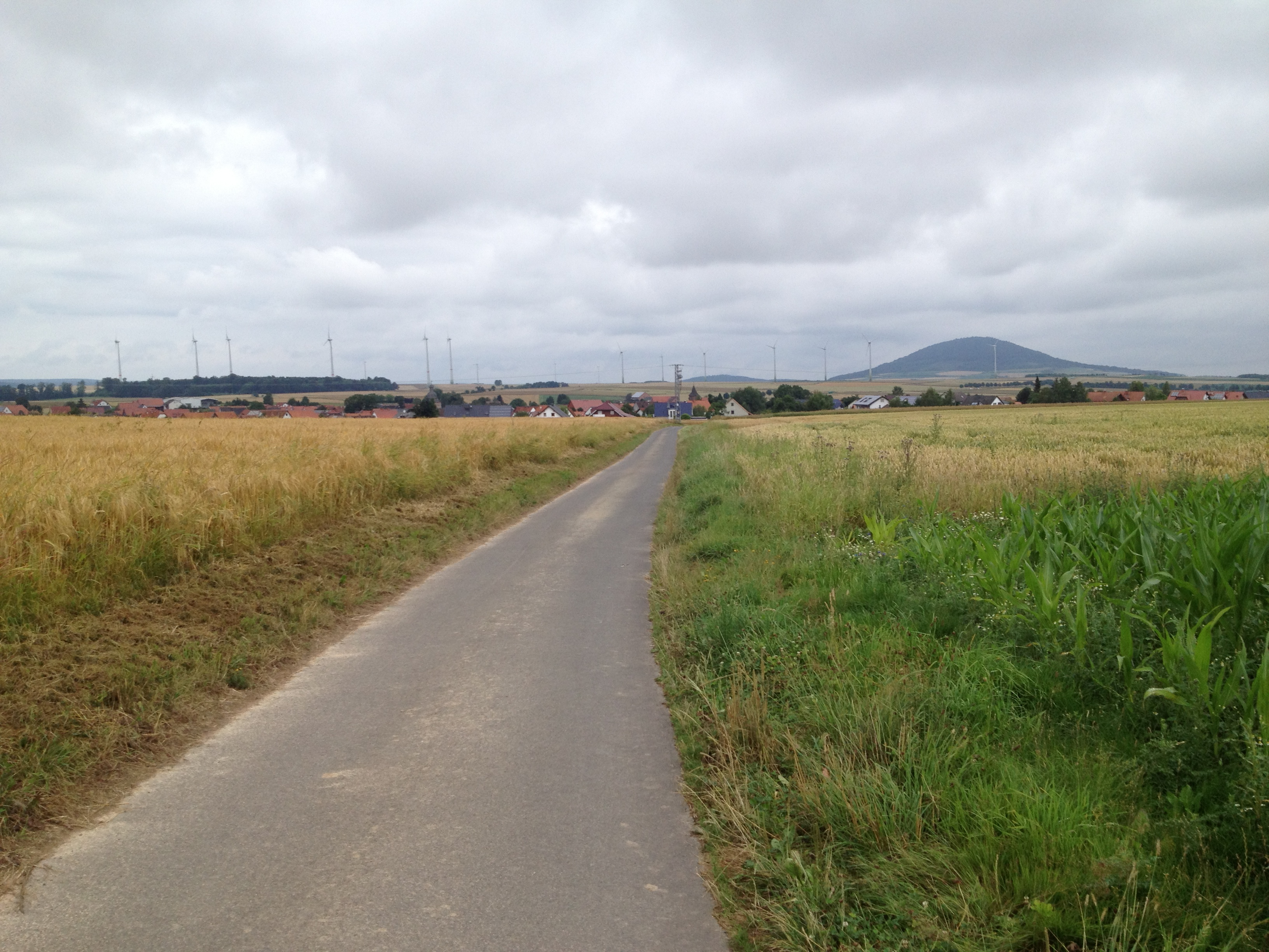 Blick vom Hessencourrierradweg auf Balhorn; im Hintergrund rechts der Isthaberg